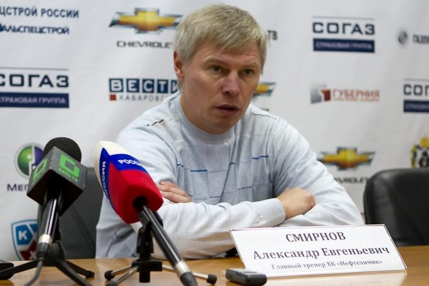 Александр Смирнов на пресс-конференции после матча КХЛ «Амур» — «Нефтехимик» 26 сентября 2011 года